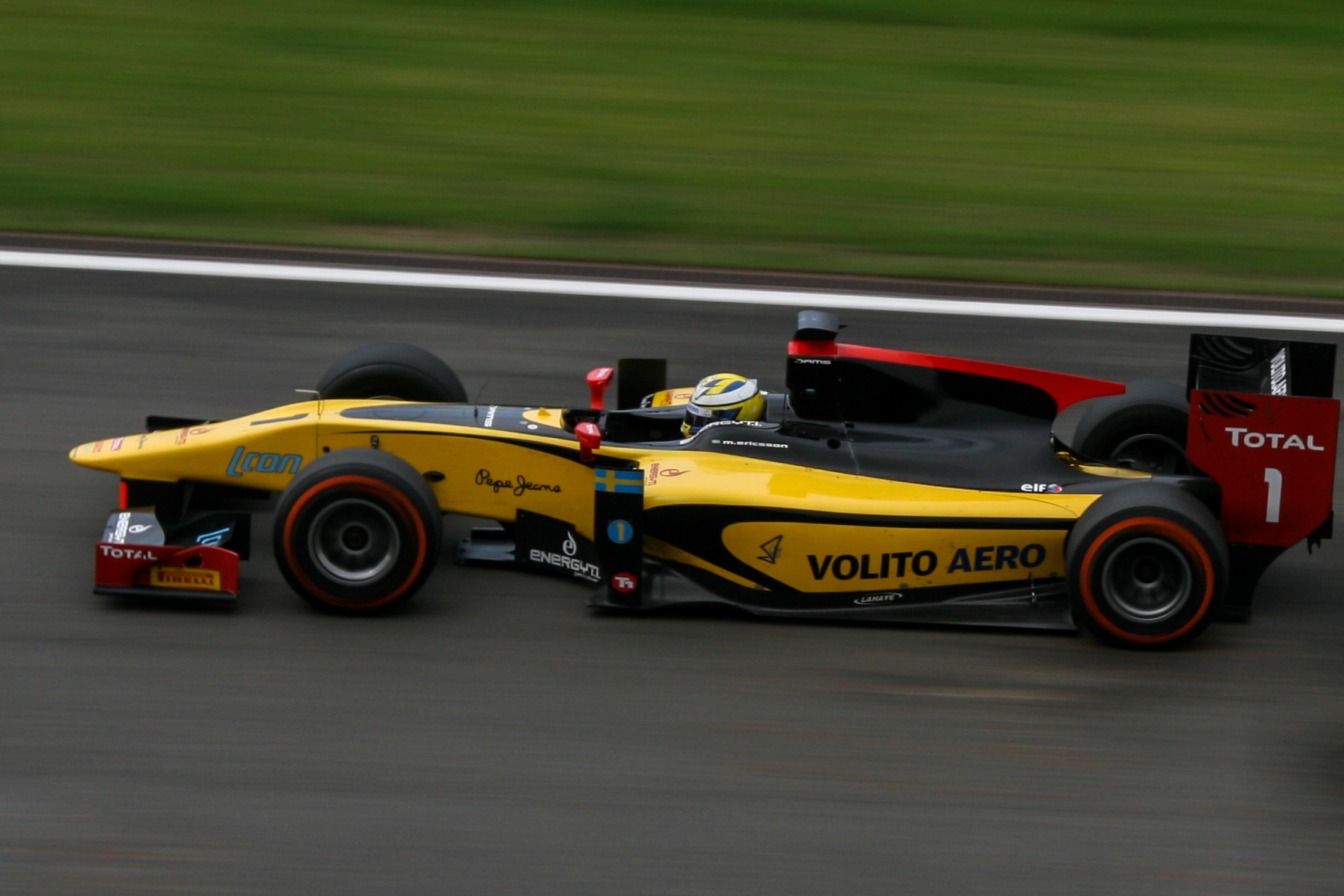 Marcus Ericsson beim Sprintrennen der GP2-Serie in Spa-Francorchamps 2013